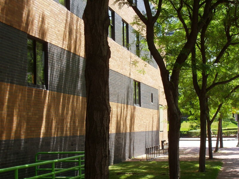 Fonte: Descrizione originale: Arthur M. Sackler Museum, Harvard University, Cambridge, Massachusetts - side view. Photograph taken by me, July 2005.